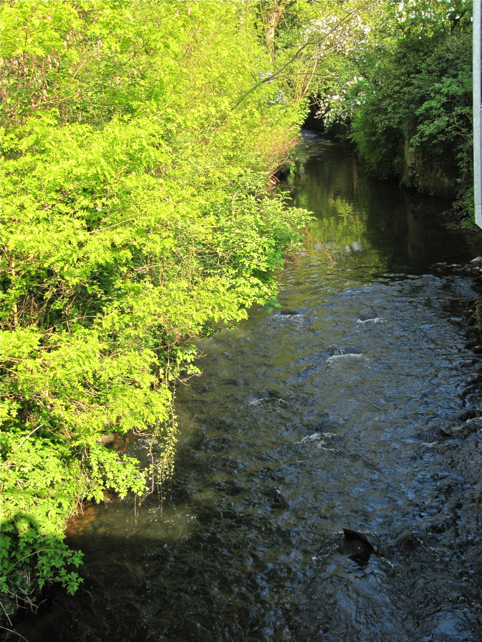 Modau and der Kaisermühle in Darmstadt-Eberstadt, Hessen